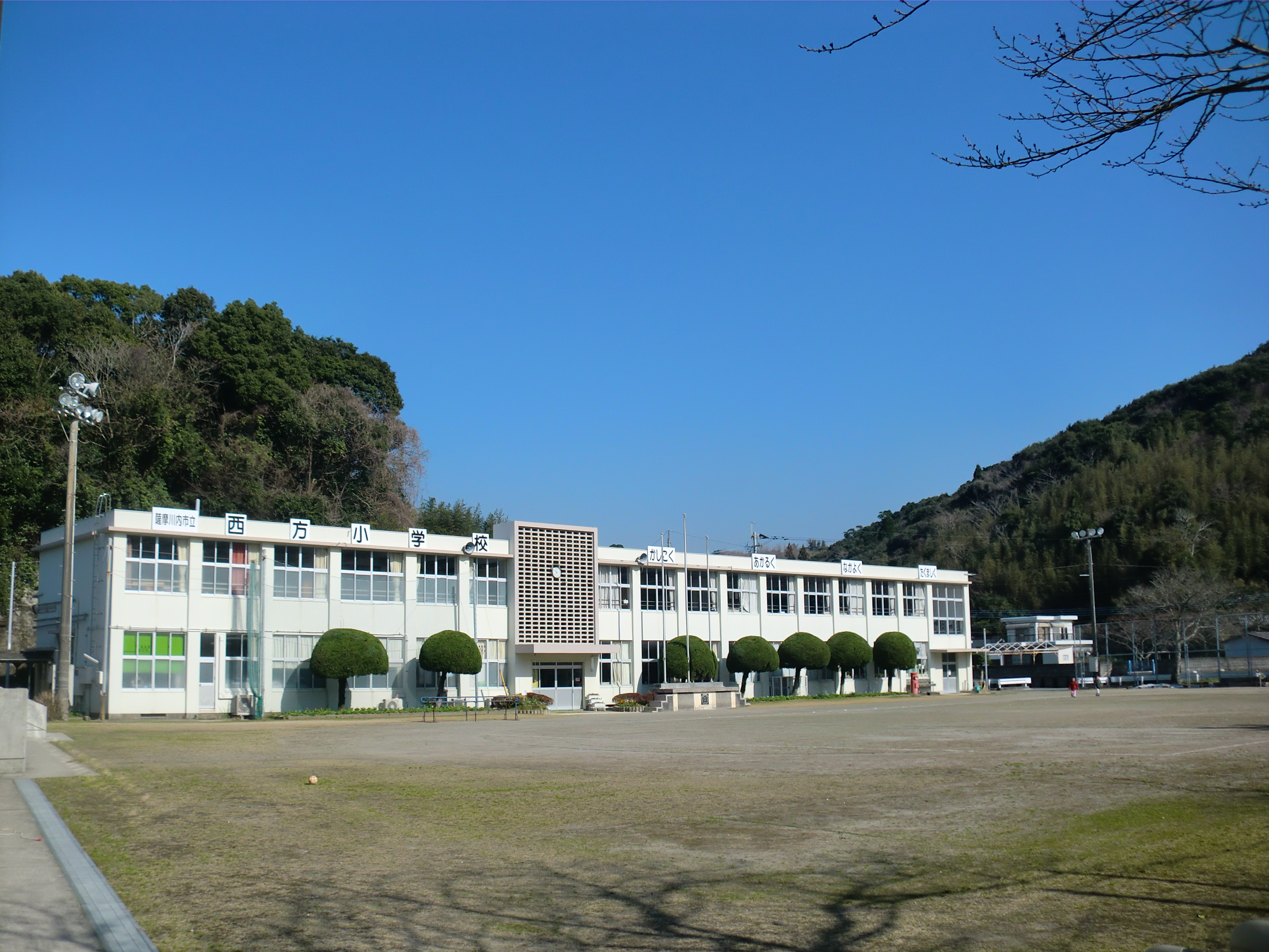 薩摩川内市にある薩摩川内市立西方（にしかた）小学校